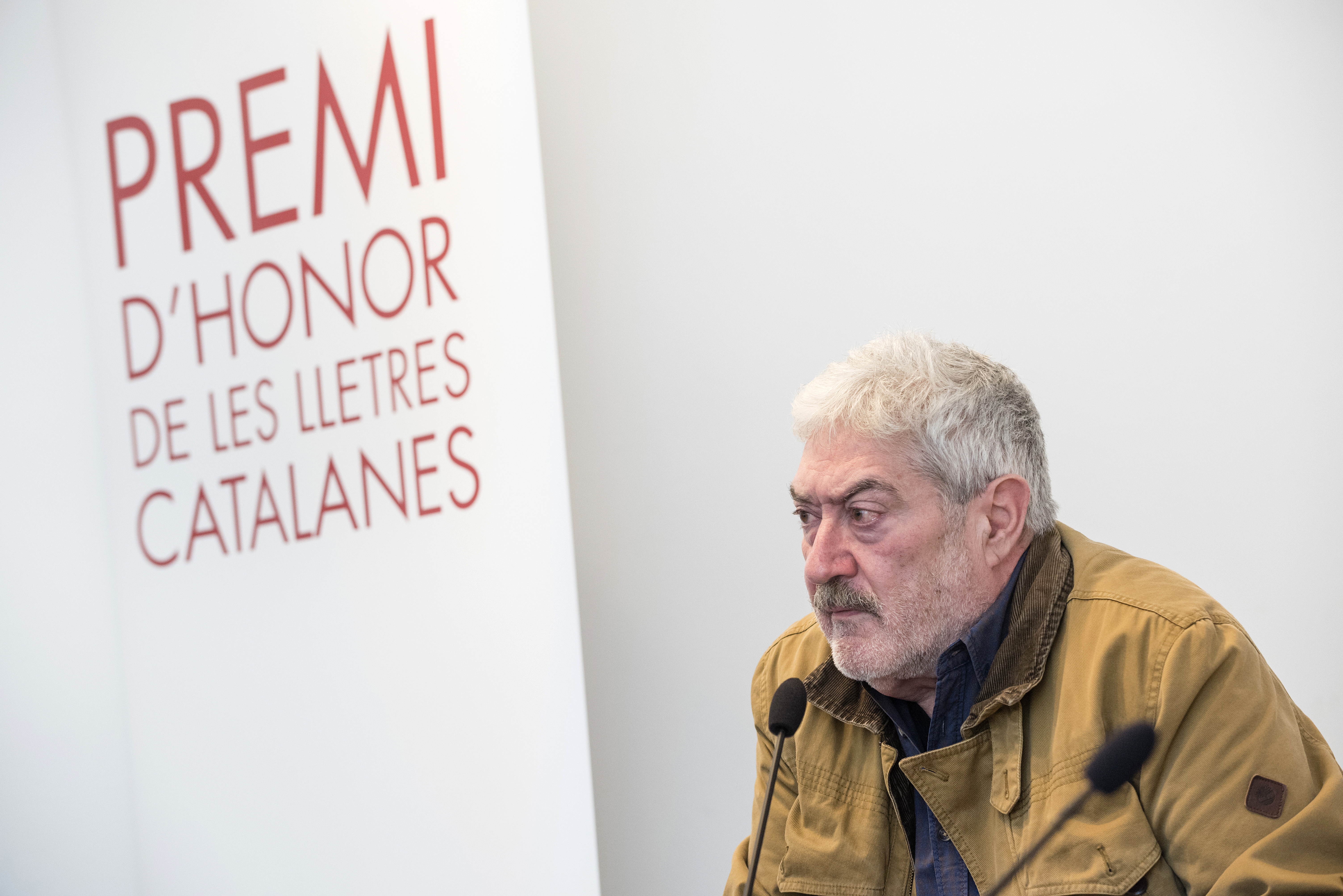 Òmnium Cultural atorga el guardó a Monzó i el defineix com “un dels millors ambaixadors de la literatura catalana actual”